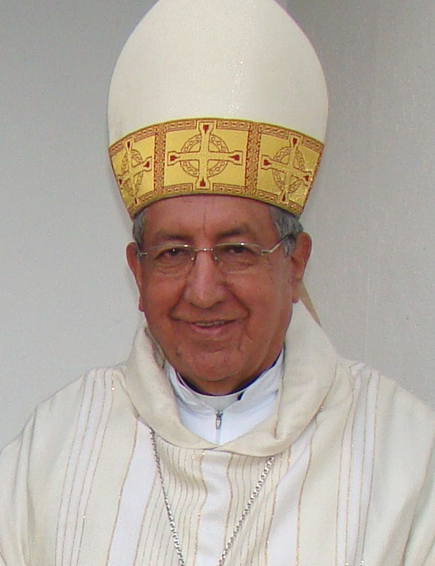 Monseñor Gilberto Jiménez Narváez, obispo auxiliar emérito de Medellín y titular de Apolonia. Colombia.